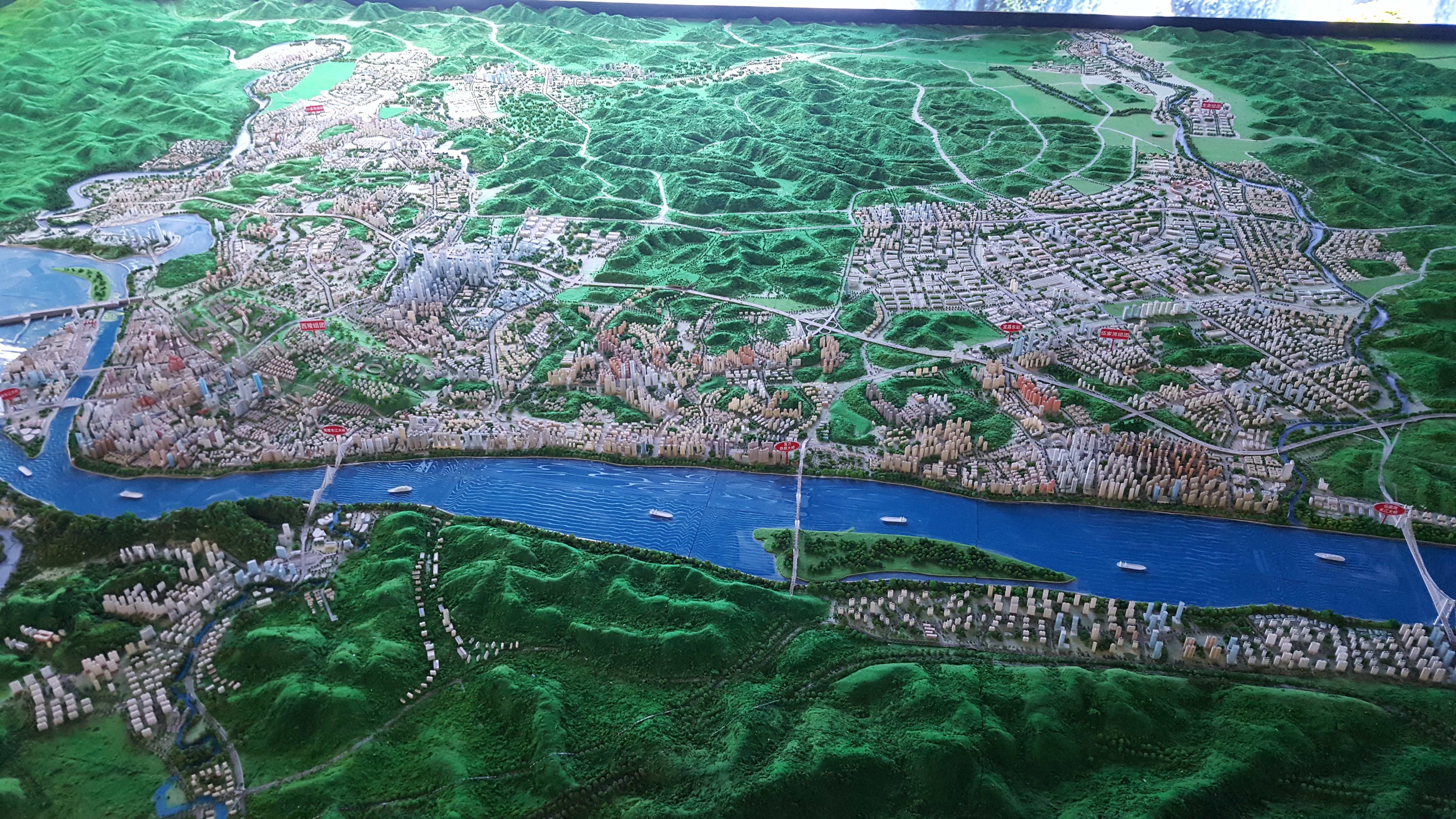 中文（中国大陆）: 宜昌市规划展览馆沙盘